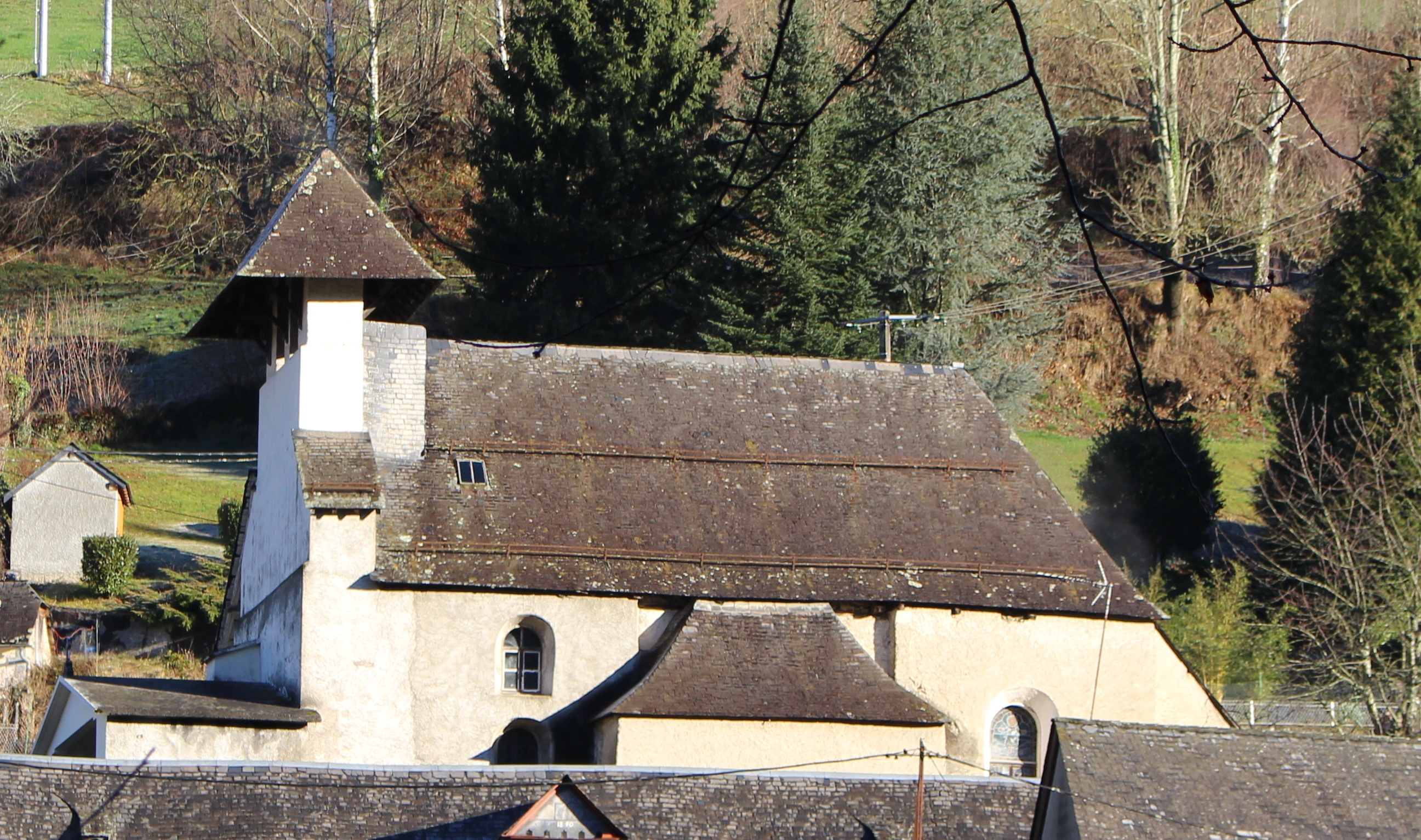 Église Notre-Dame-de-l'Assomption de Juncalas (Hautes-Pyrénées)